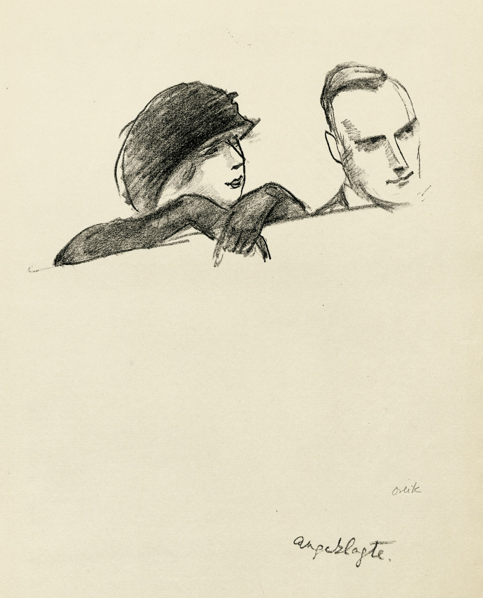 "Angeklagte", aus: Aus dem Reigen-Process Lithographie, 1921.